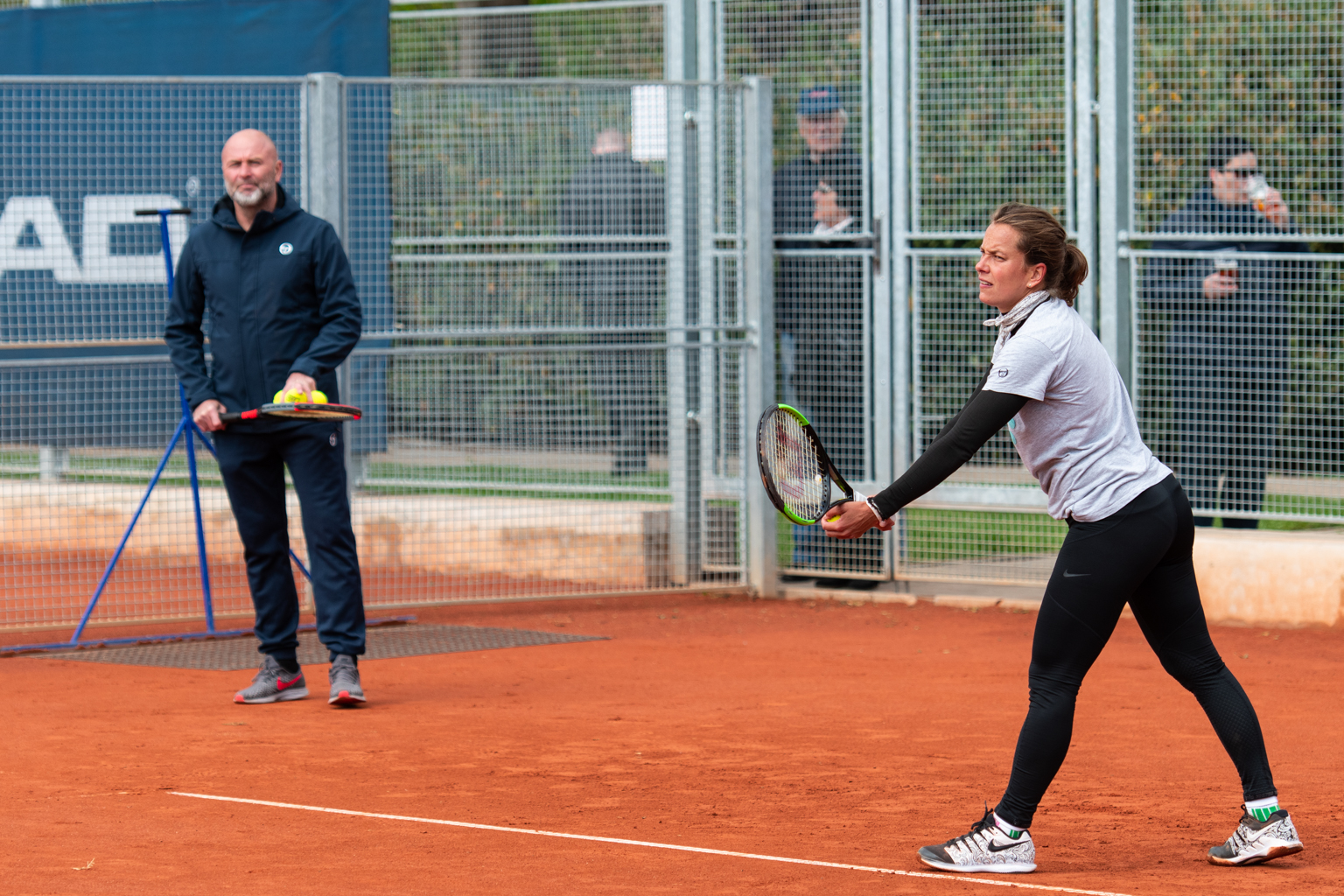 Barbora Strýcová